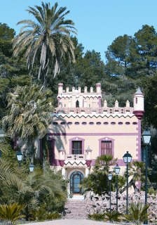 Villa Retiro o la torre del Millonari de Xerta. Atribuida a l'arquitecte Josep Fontserè i Mestre.